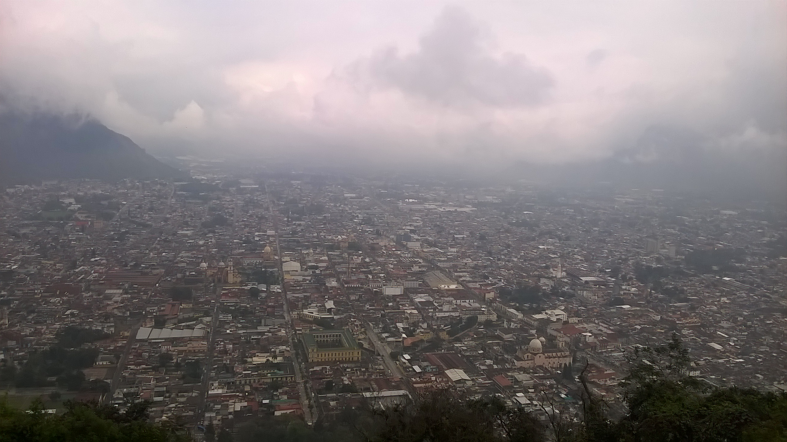 Panorámica de la ciudad de Orizaba